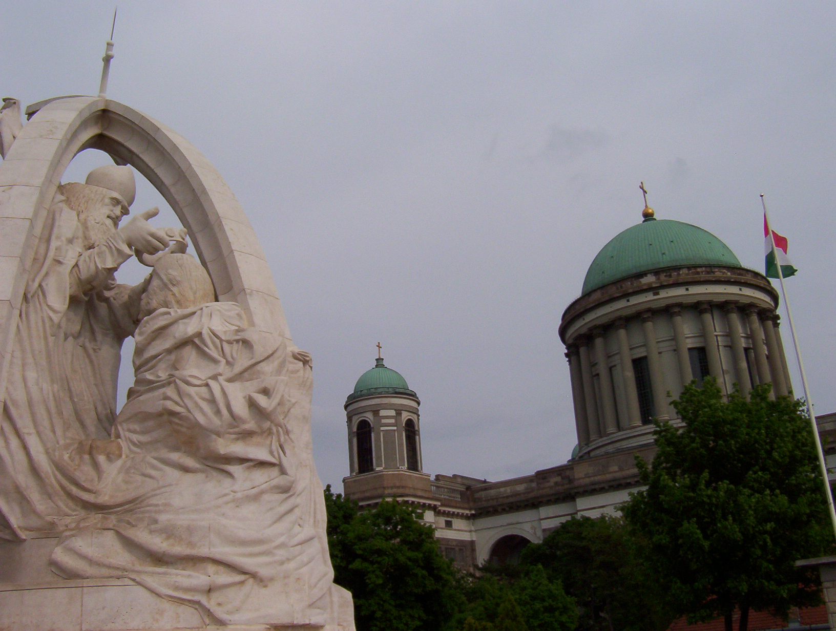 Photo prise par moi-meme en mai 2005